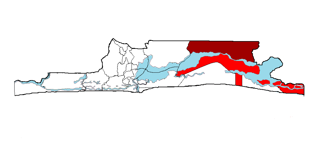 Ubicación de Epe en el Estado de Lagos